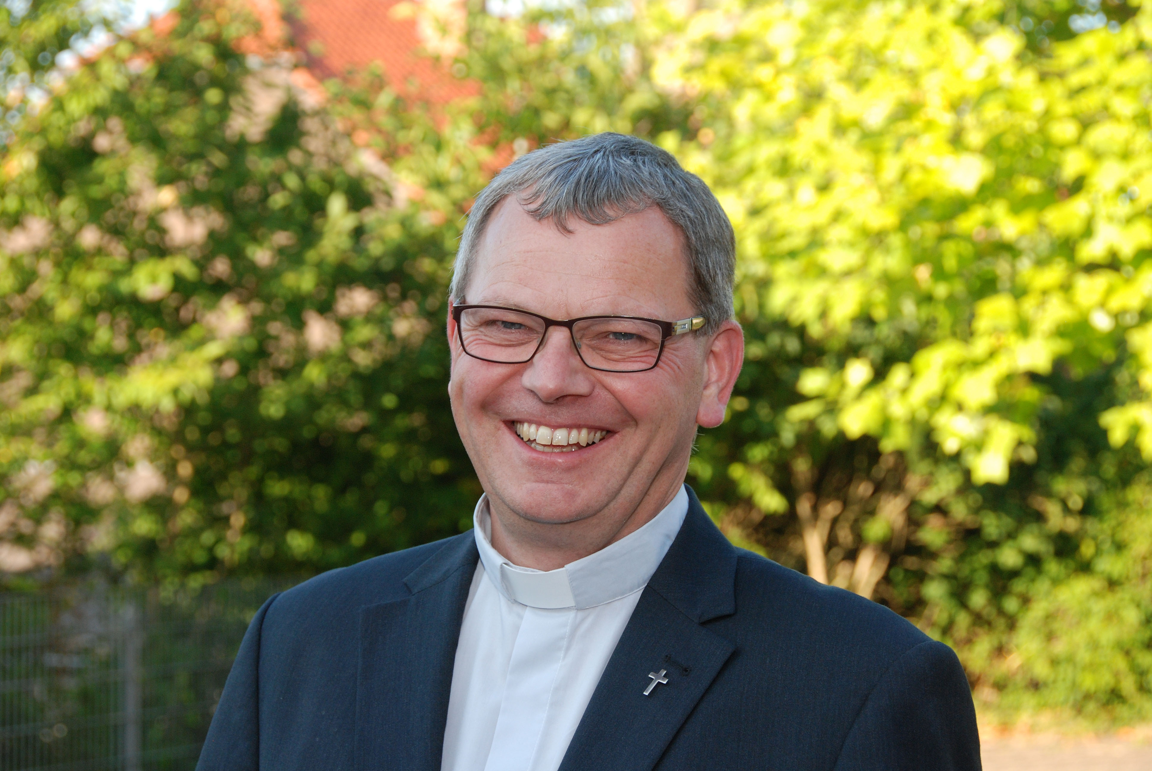 Ulrich von Plettenberg, Generalvikar des Bistums Trier